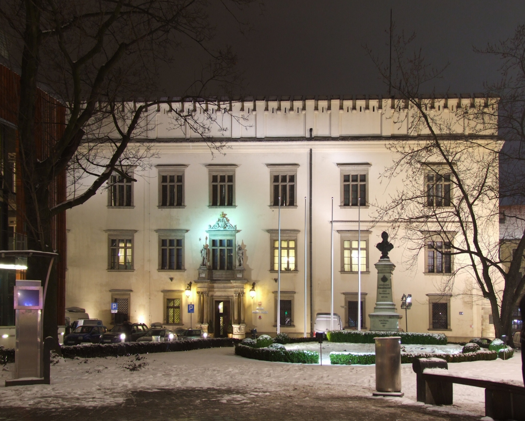 Magistrat krakowski (Pałac Wielopolskich) po zmroku